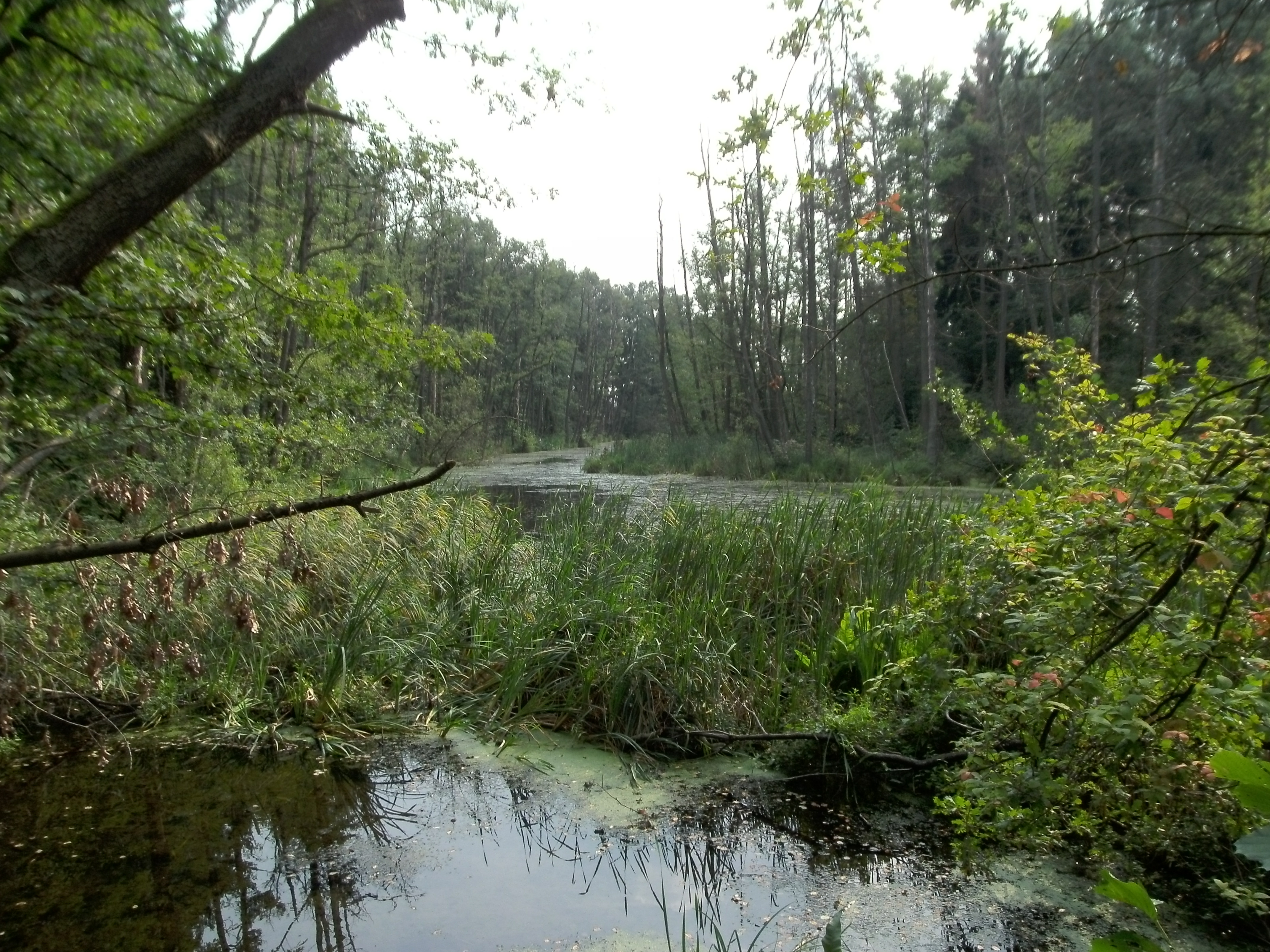 Am Glasowbach